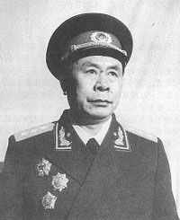 陈奇涵上将，中国人民解放军开国上将。